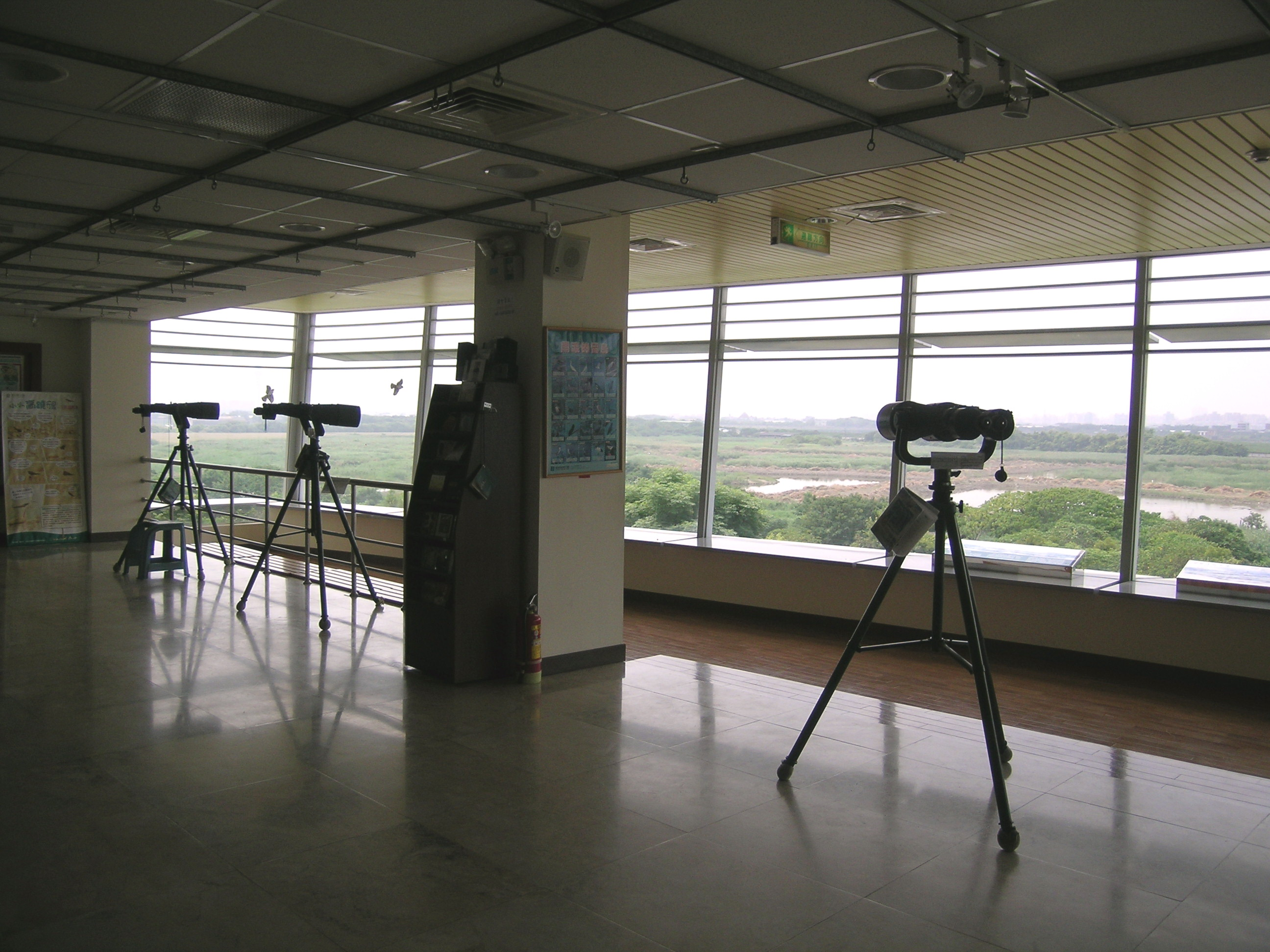 关渡自然公园的观鸟平台。